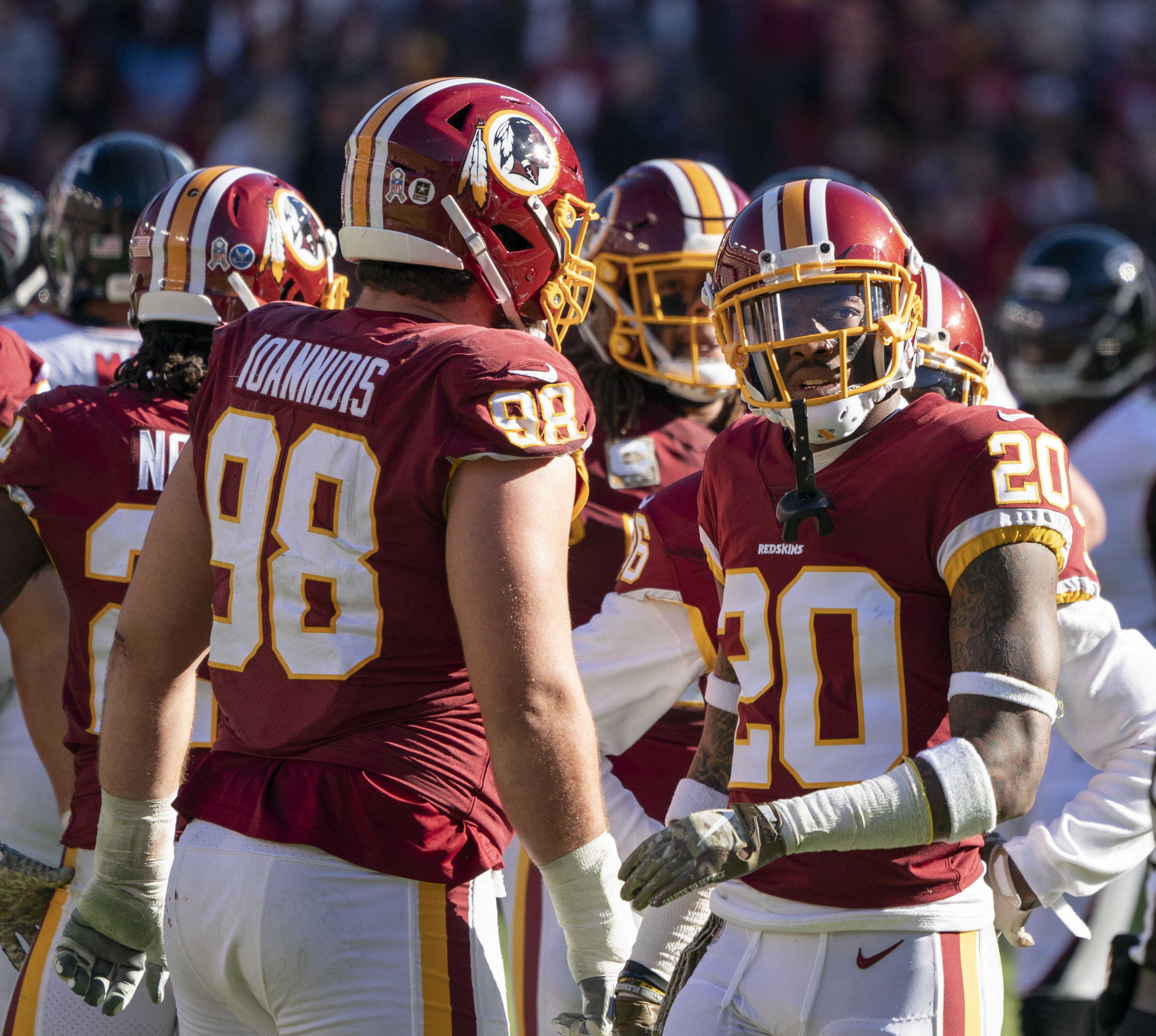 Falcons at Redskins 11/04/18